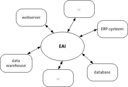 Enterprise Application Integration. Schema gemaakt door Sander Spek.